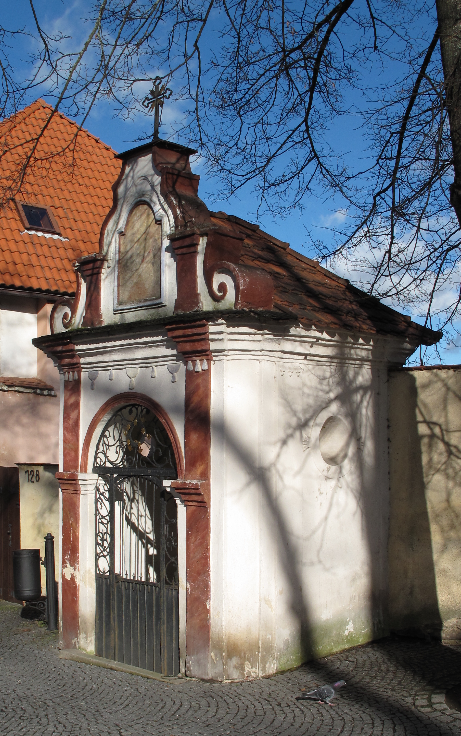 Kaple svatého Jana Nepomuckého v Solní ulici v Prachaticích, Česká republika.